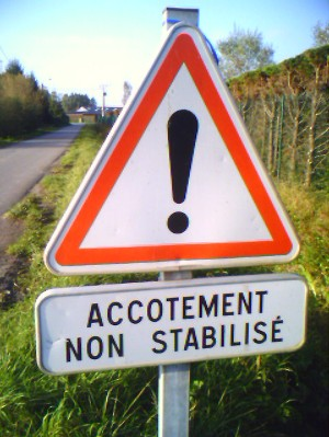 Panneau de danger de type A14 accompagnée d'un panonceau vue dans le département du Nord